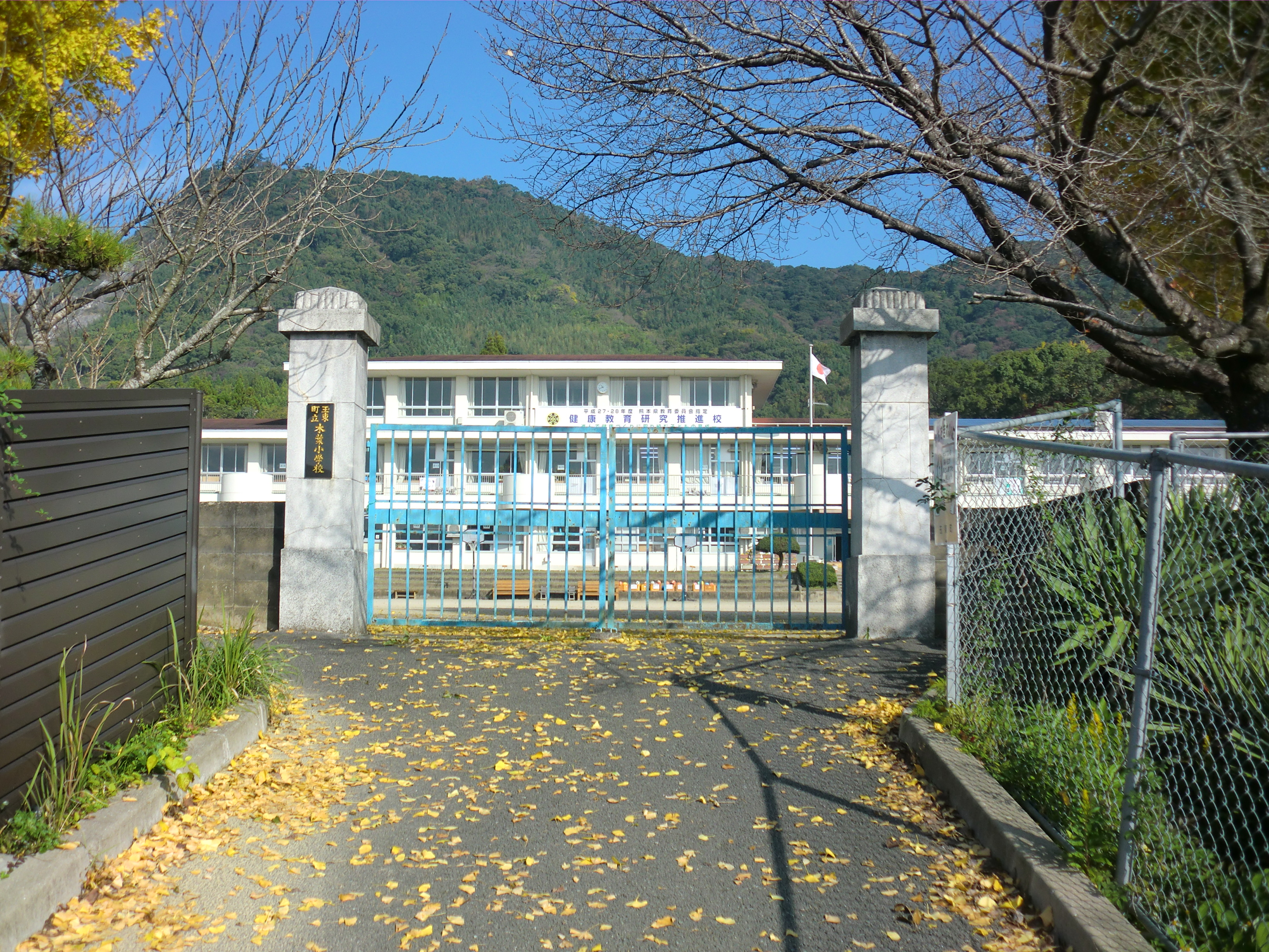 熊本県玉名郡玉東町にある玉東町立木葉小学校